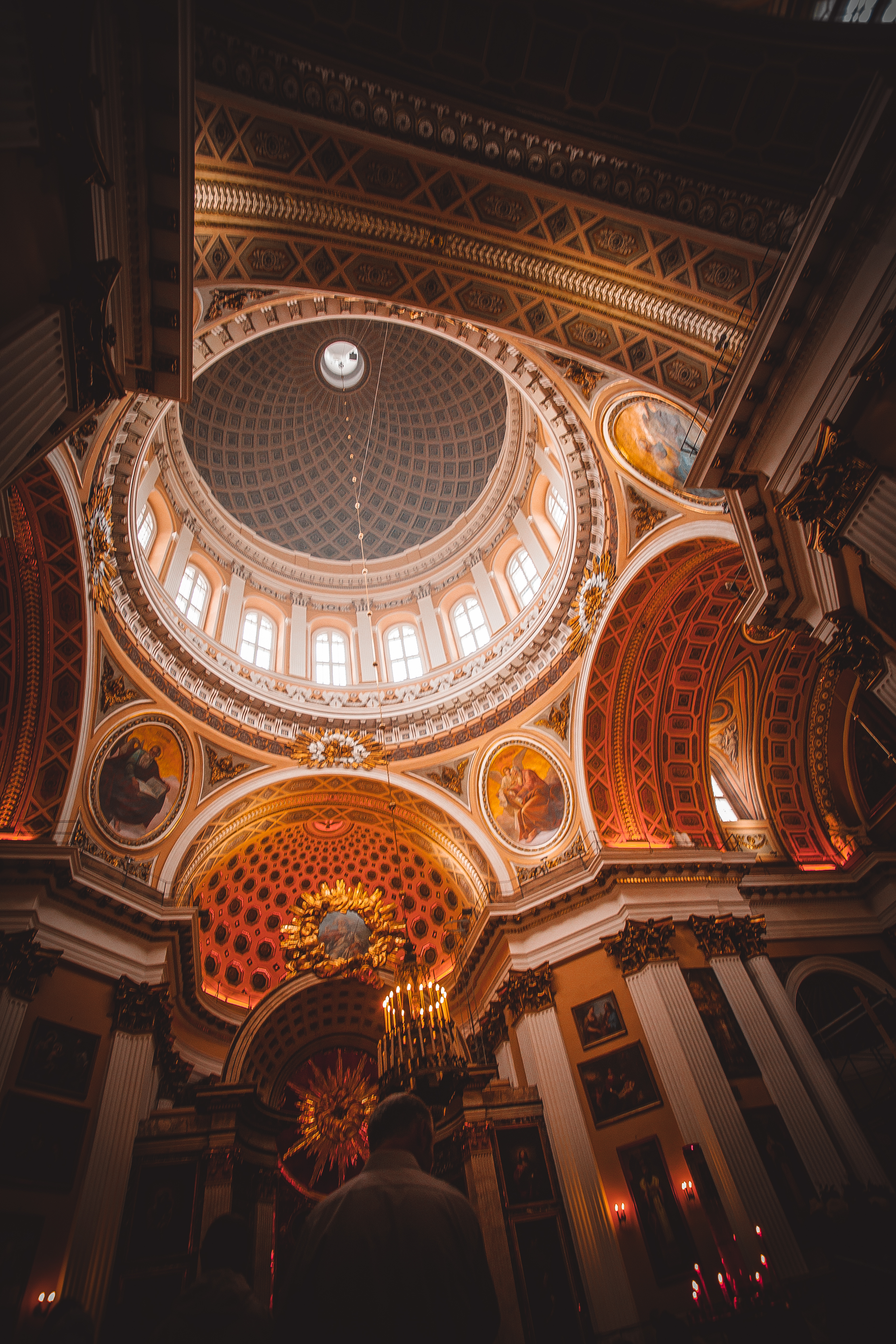 Собор Троицкий с двумя соединительными флигелями (Санкт-Петербург и Лен.область, Санкт-Петербург, р. Монастырки наб., 1)